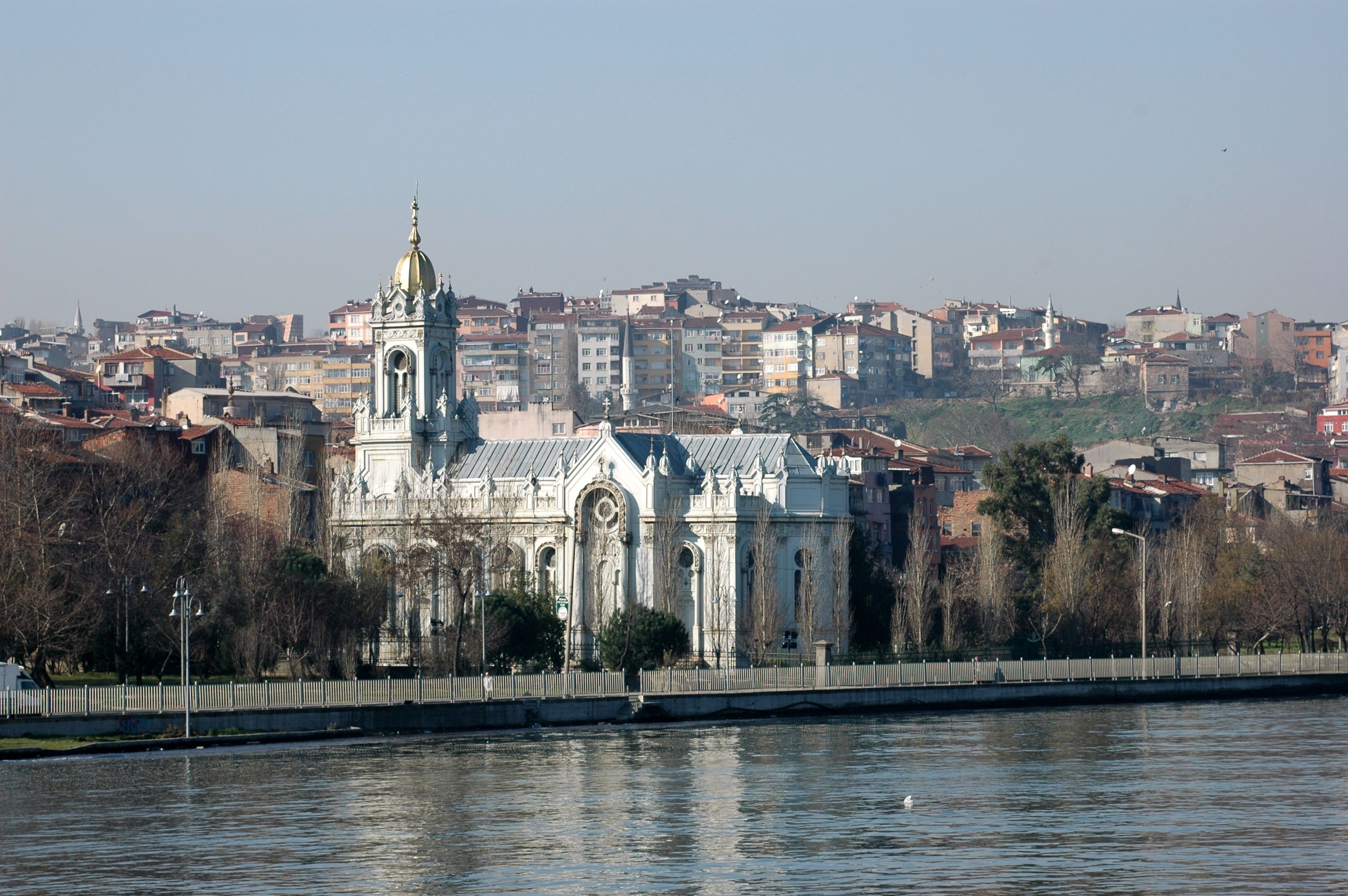 Istanbul - Sant Esteve dels Búlgars